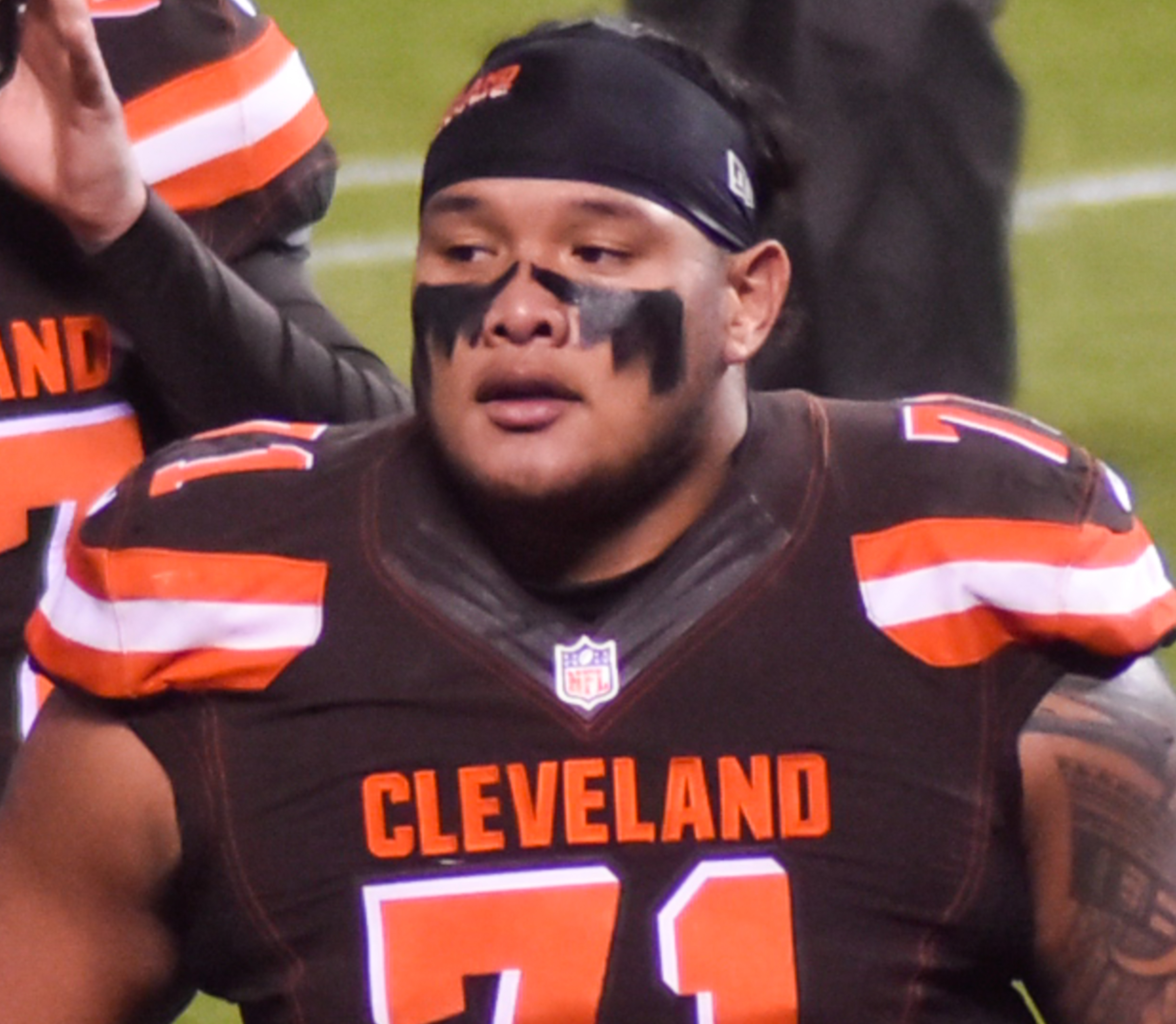 Ravens at Browns